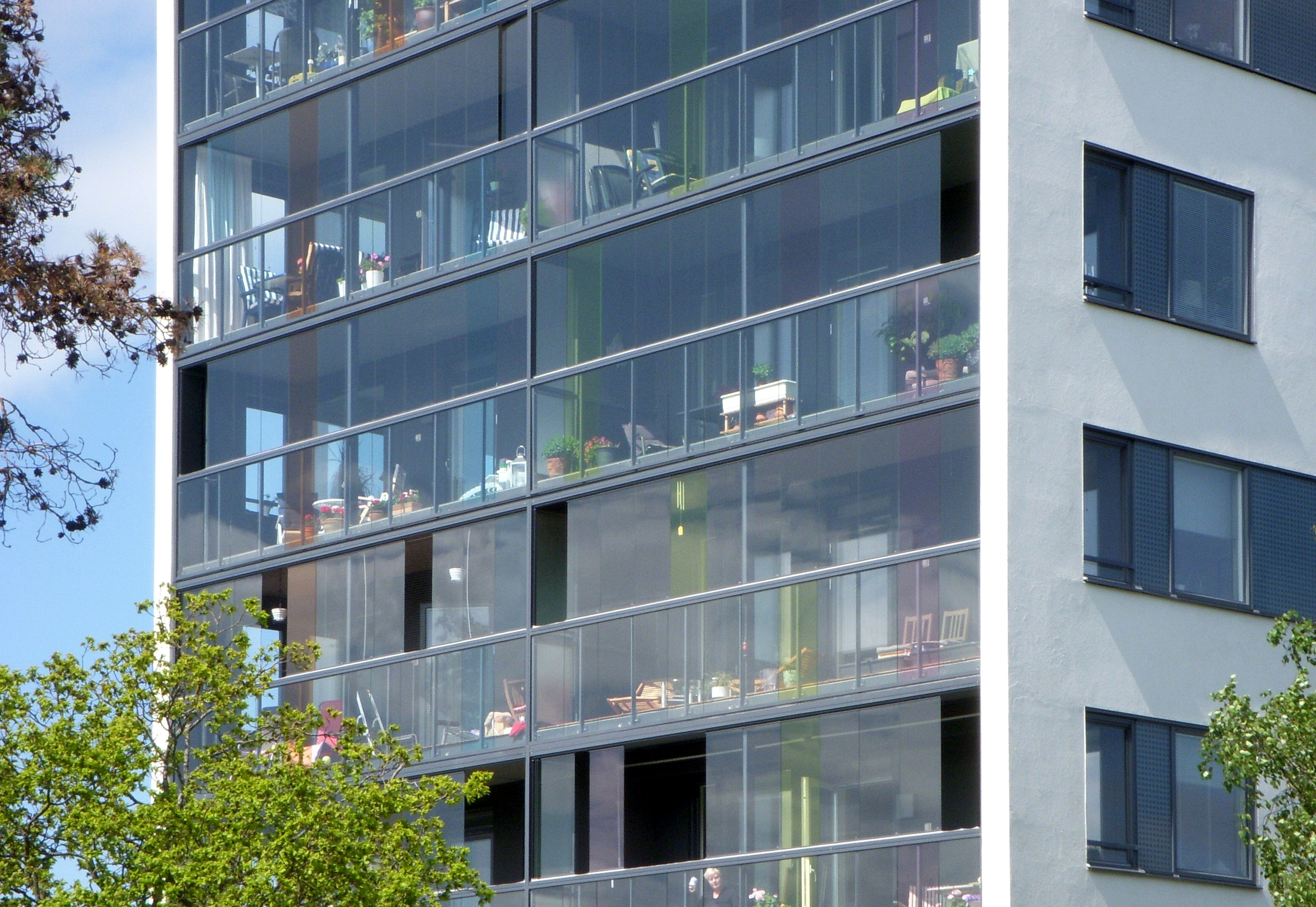 Flerbostadshuset Brommahöjden i Bromma, fasaddetalj